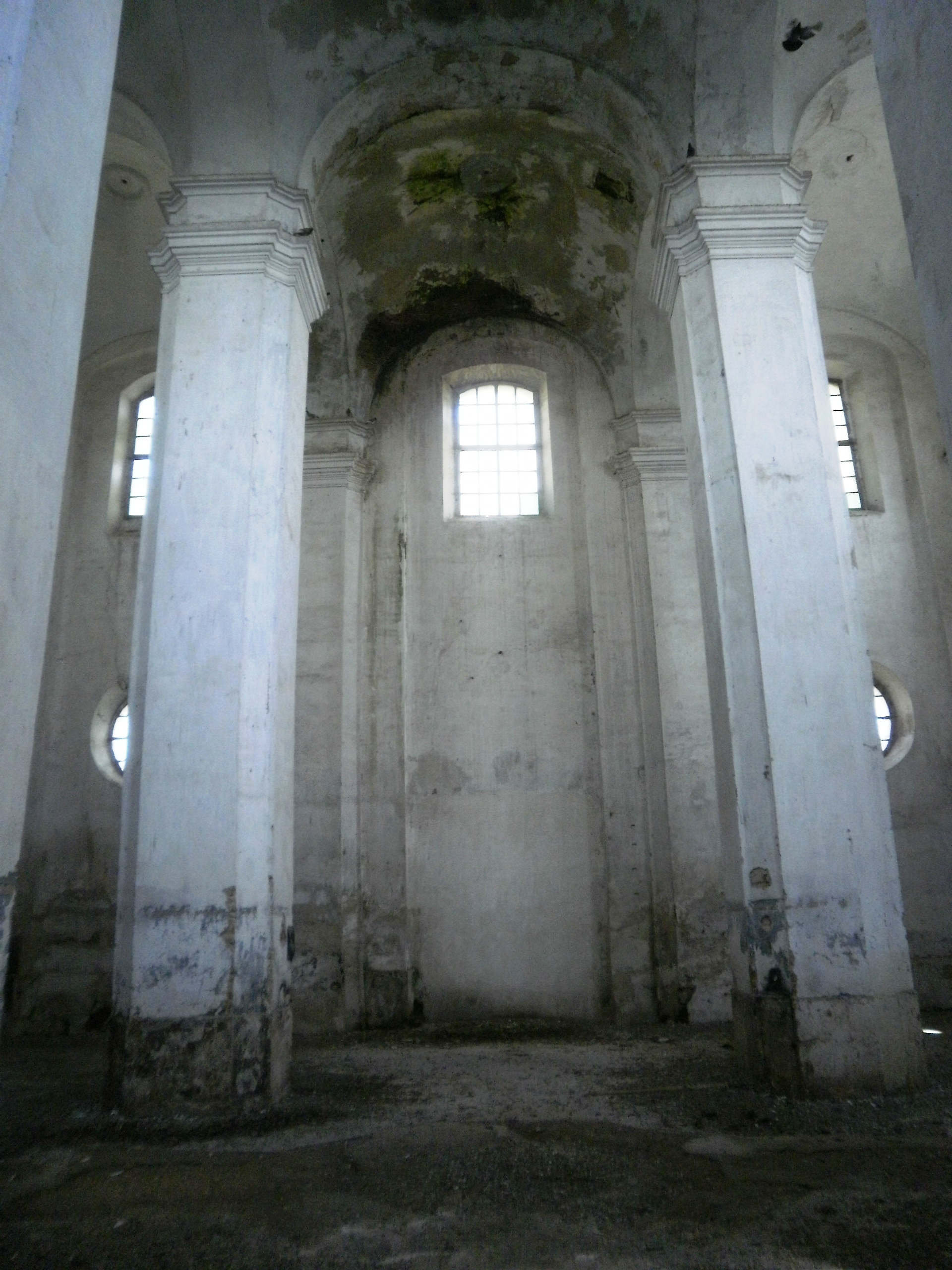 Синагога (мур.), Дубно, вул.Кирила і Мефодія, 23